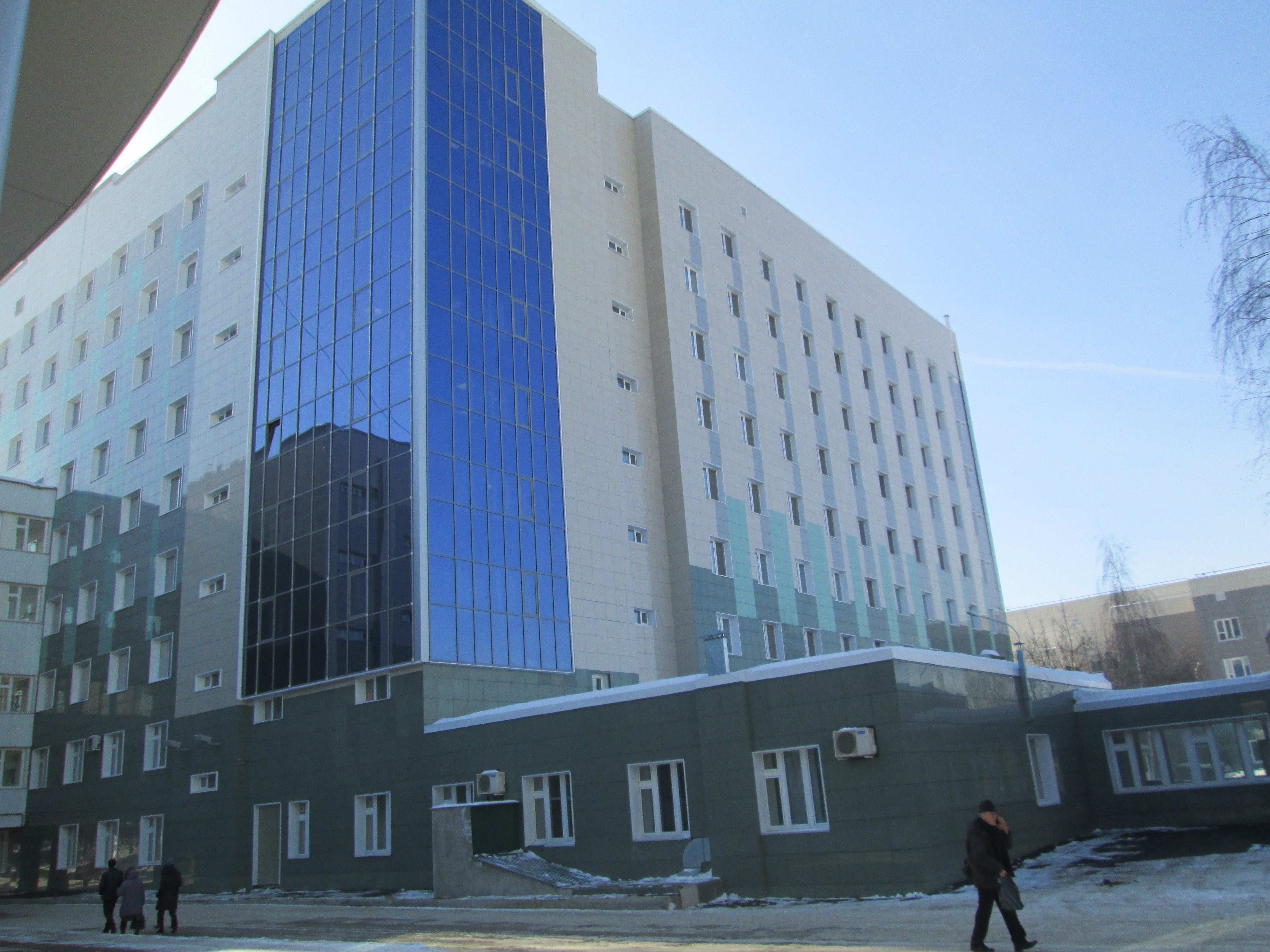 Республиканская больница в Казани. Вид со двора